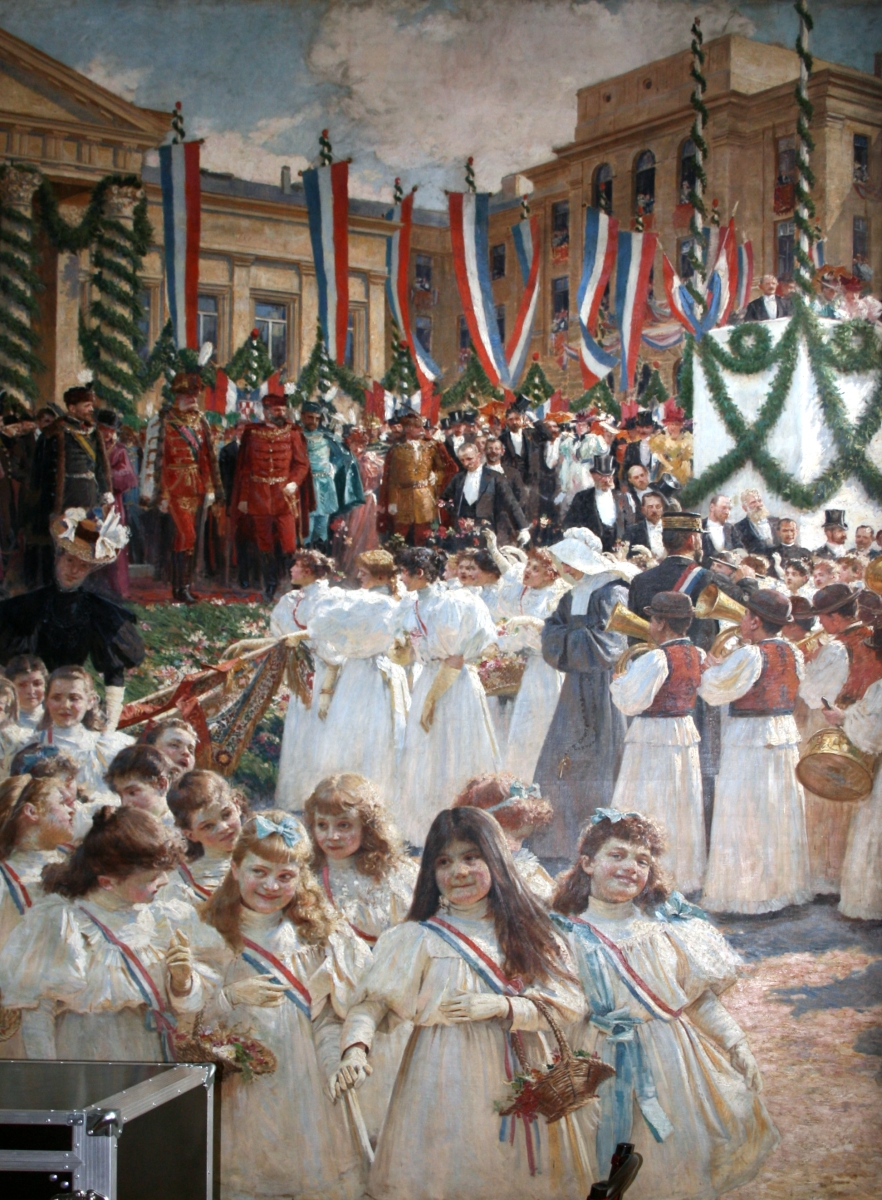 Živio kralj, rad Vlahe Bukovca u Hrvatskom institutu za povijest u Zagrebu